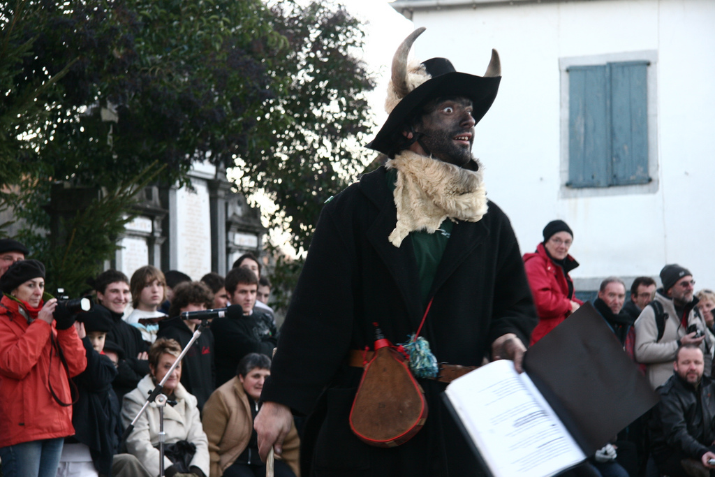 2009ko Barkoxeko Maskaradak Barkoxen. Kabana. 2009-01-19